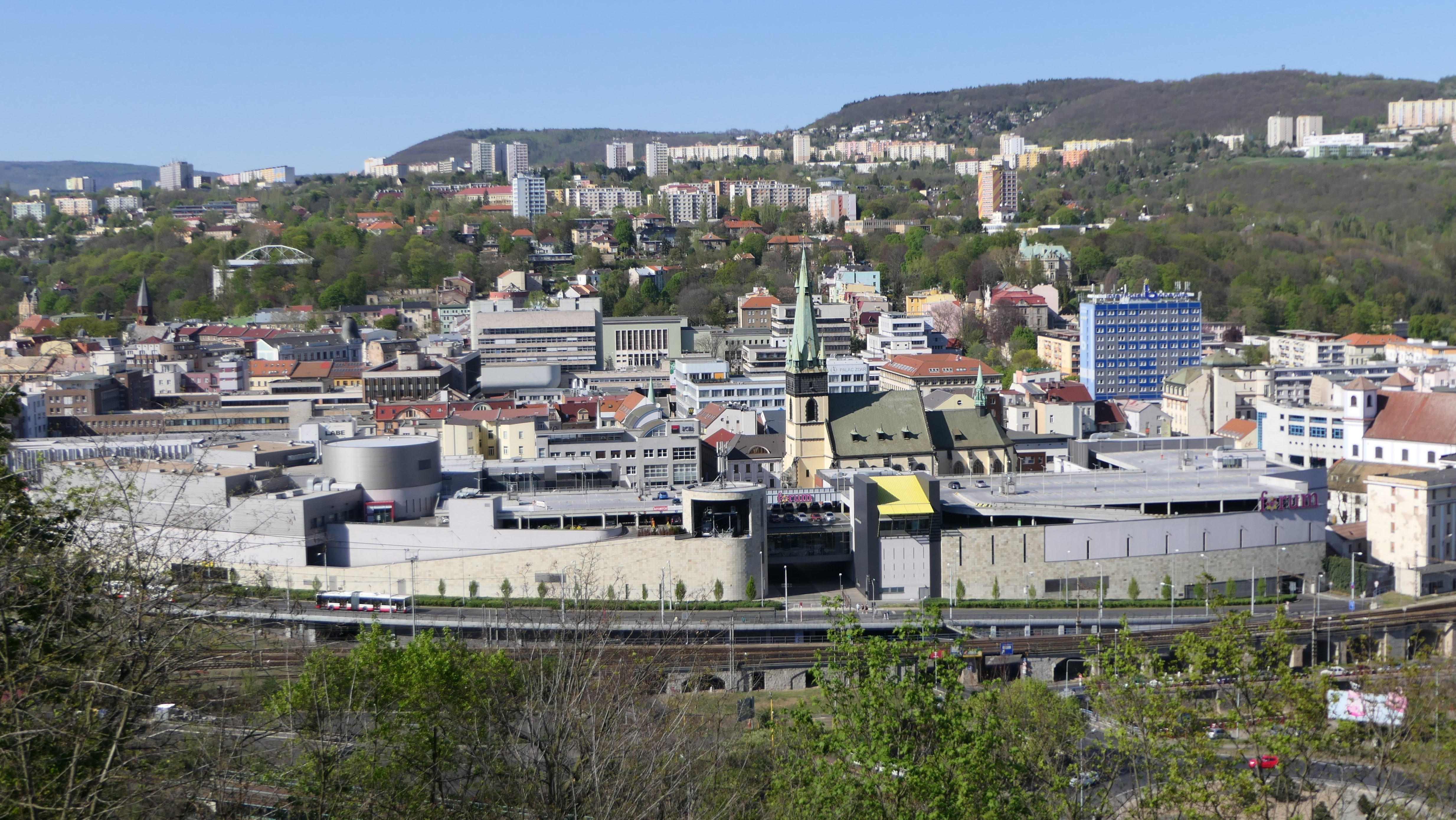 Blick auf die Altstadt von Usti nad Labem